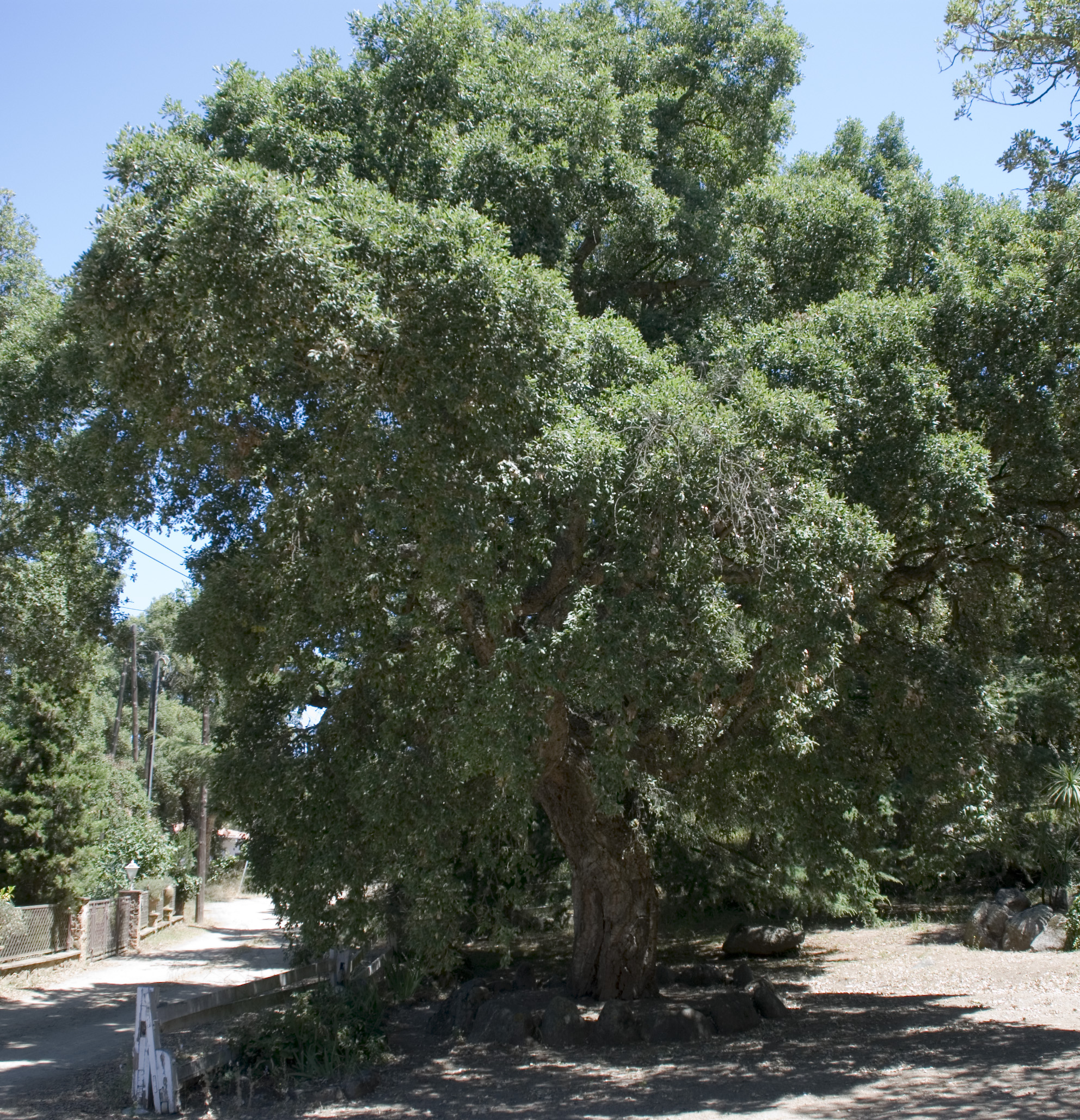 Suro gros de El Senyal Vell, Romanyà de la Selva, CT.Camera data Camera Nikon D80 Lens Nikon AF-S DX 18-135 mm Focal length 18 mm Aperture f/3.5 Exposure time 200 s Sensivity ISO 100